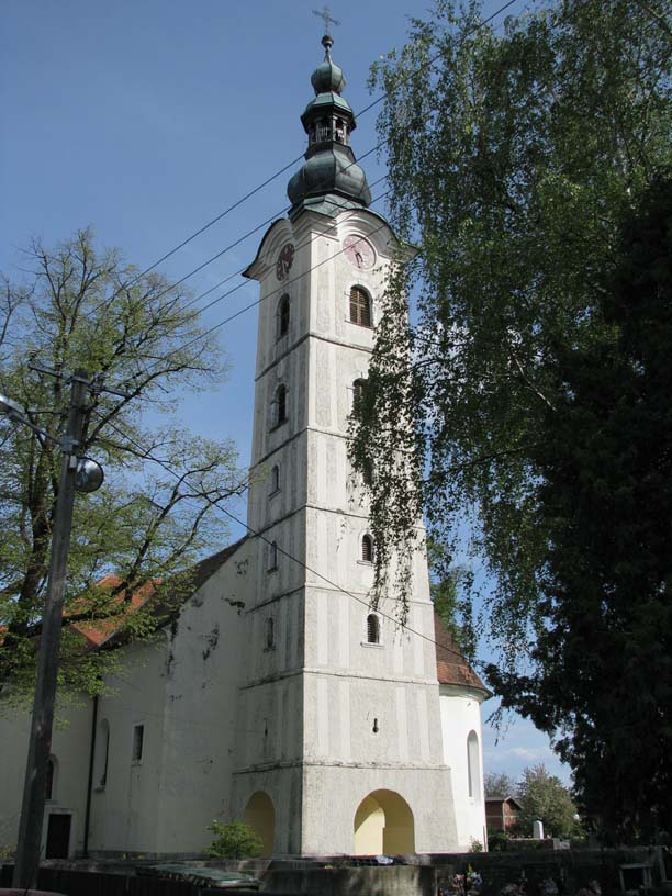 Crkva Sv. Vida, Javorje, Brdovec